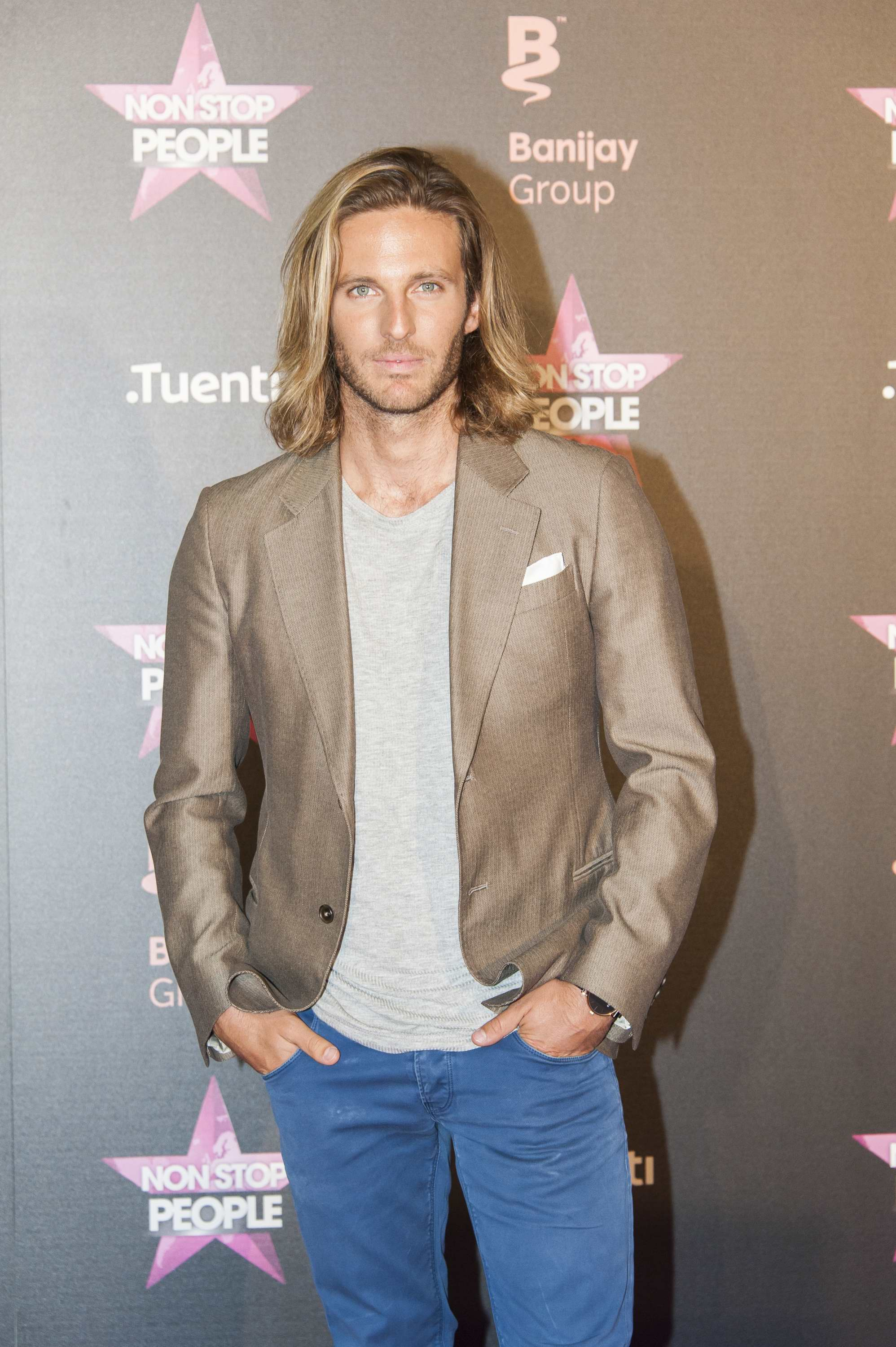 Fotos del photocall y fiesta de lanzamiento de un nuevo canal de televisión en España.